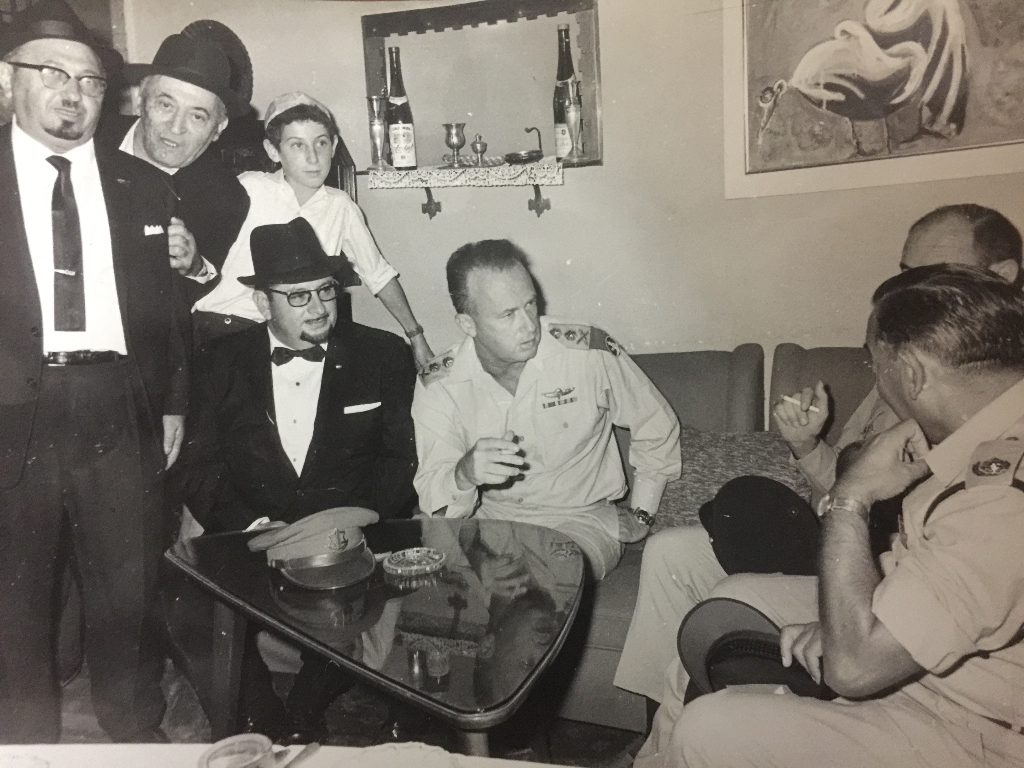 רפאל אבוהב עם הרמטכ"ל יצחק רבין וקצינים אחרים בצה"ל